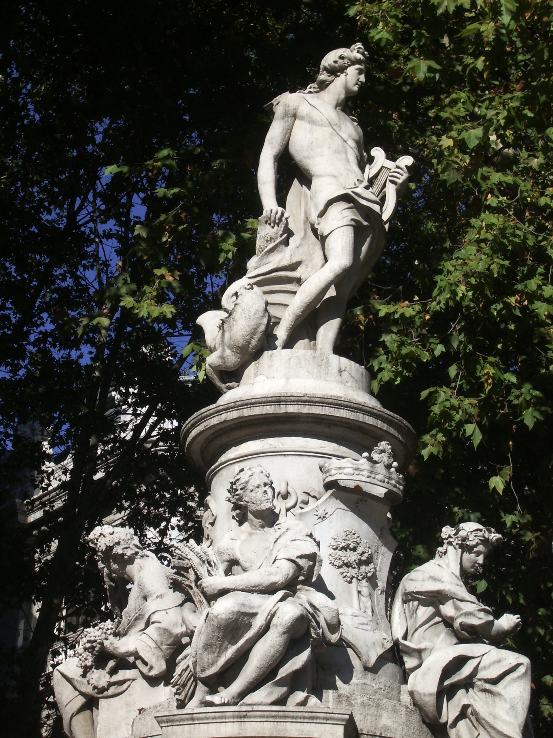 Estatua de Apolo (Fuente de Apolo del Paseo del Prado, Madrid, España)